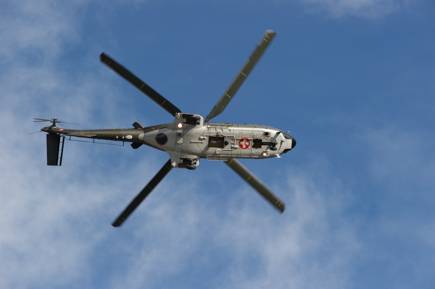 Axalp